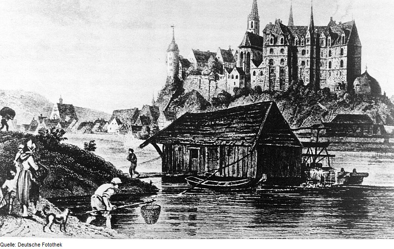 Original image description from the Deutsche FotothekMeißen. Stadtansicht mit Schiffsmühle, Radierung, 1840 (Stadtarchiv Meißen)